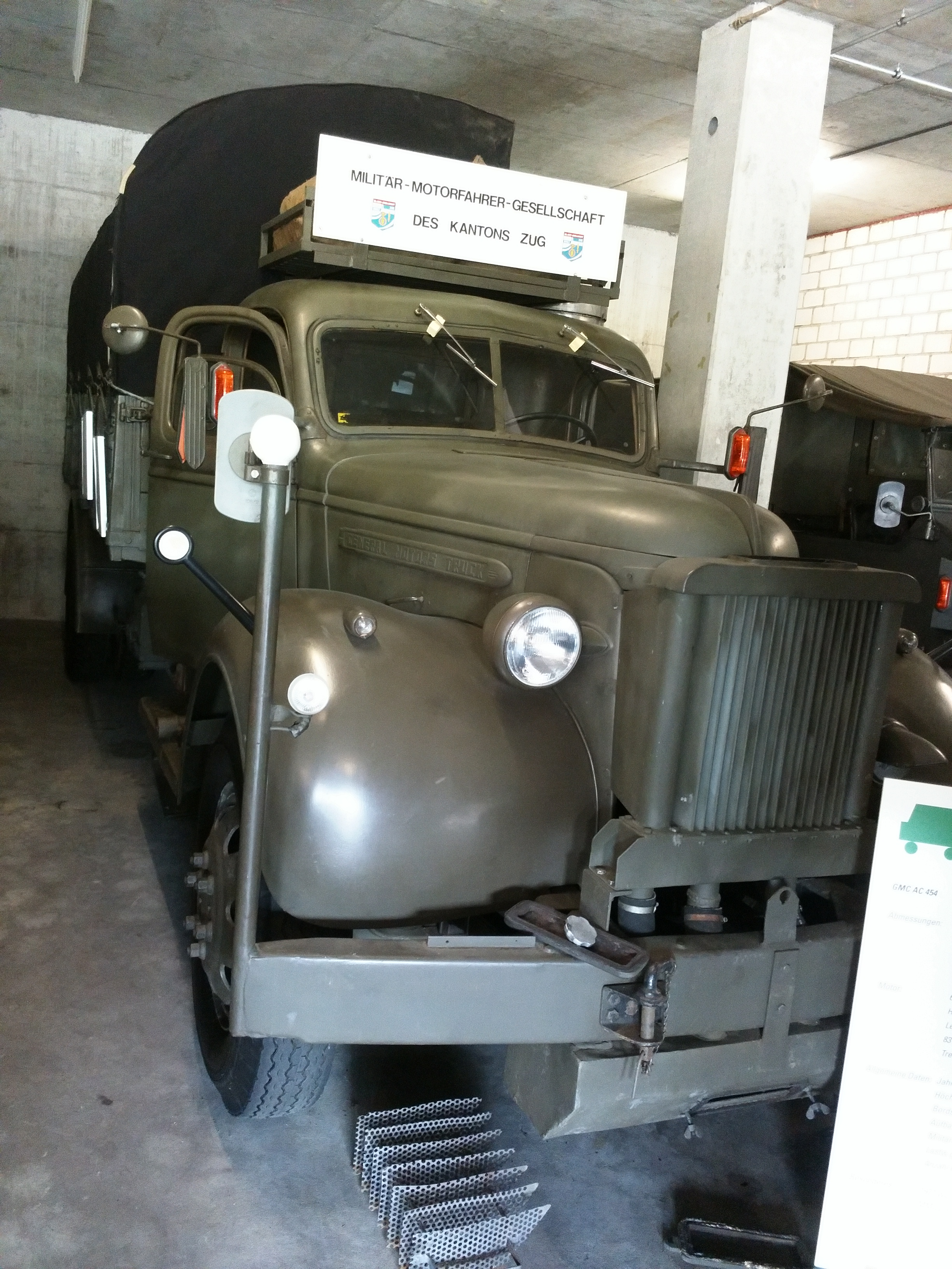 GMC AC 454 front